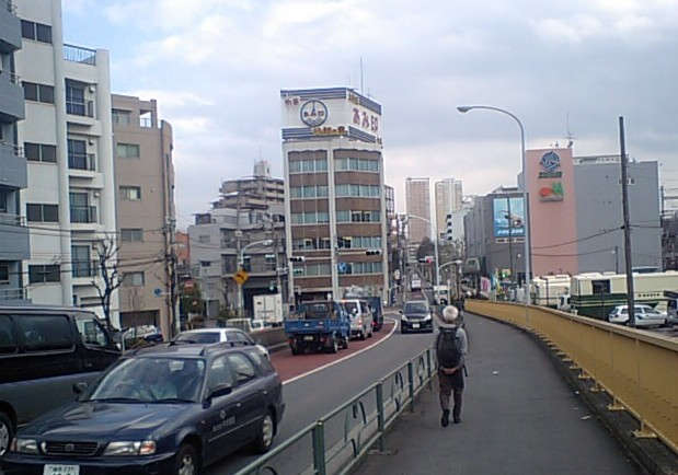 あみ印食品工業本社。東京都北区東田端一丁目。